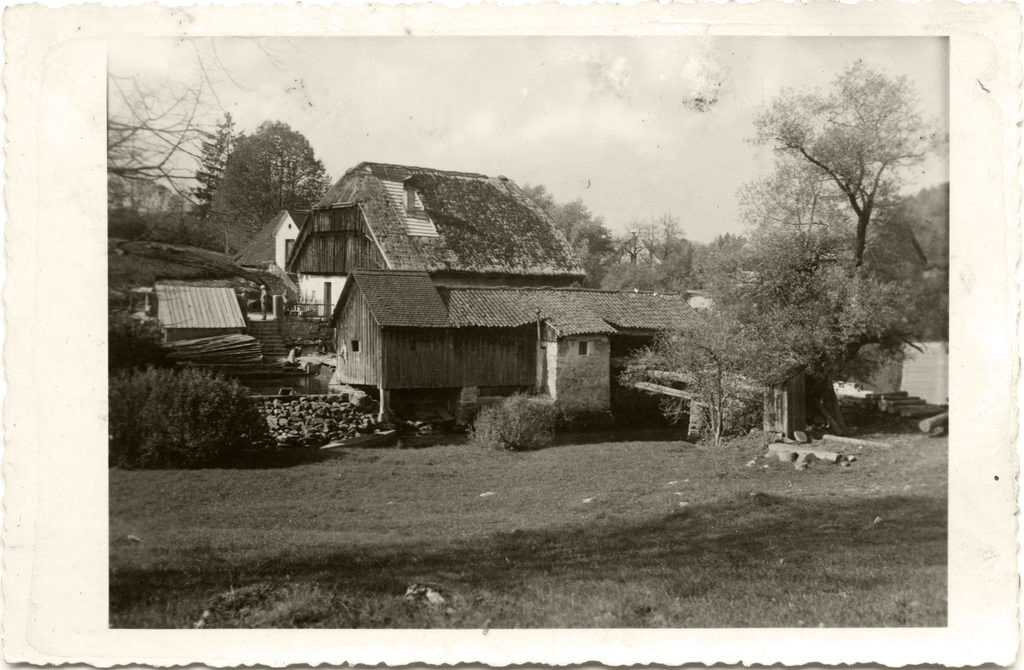 Razglednica Markovca.